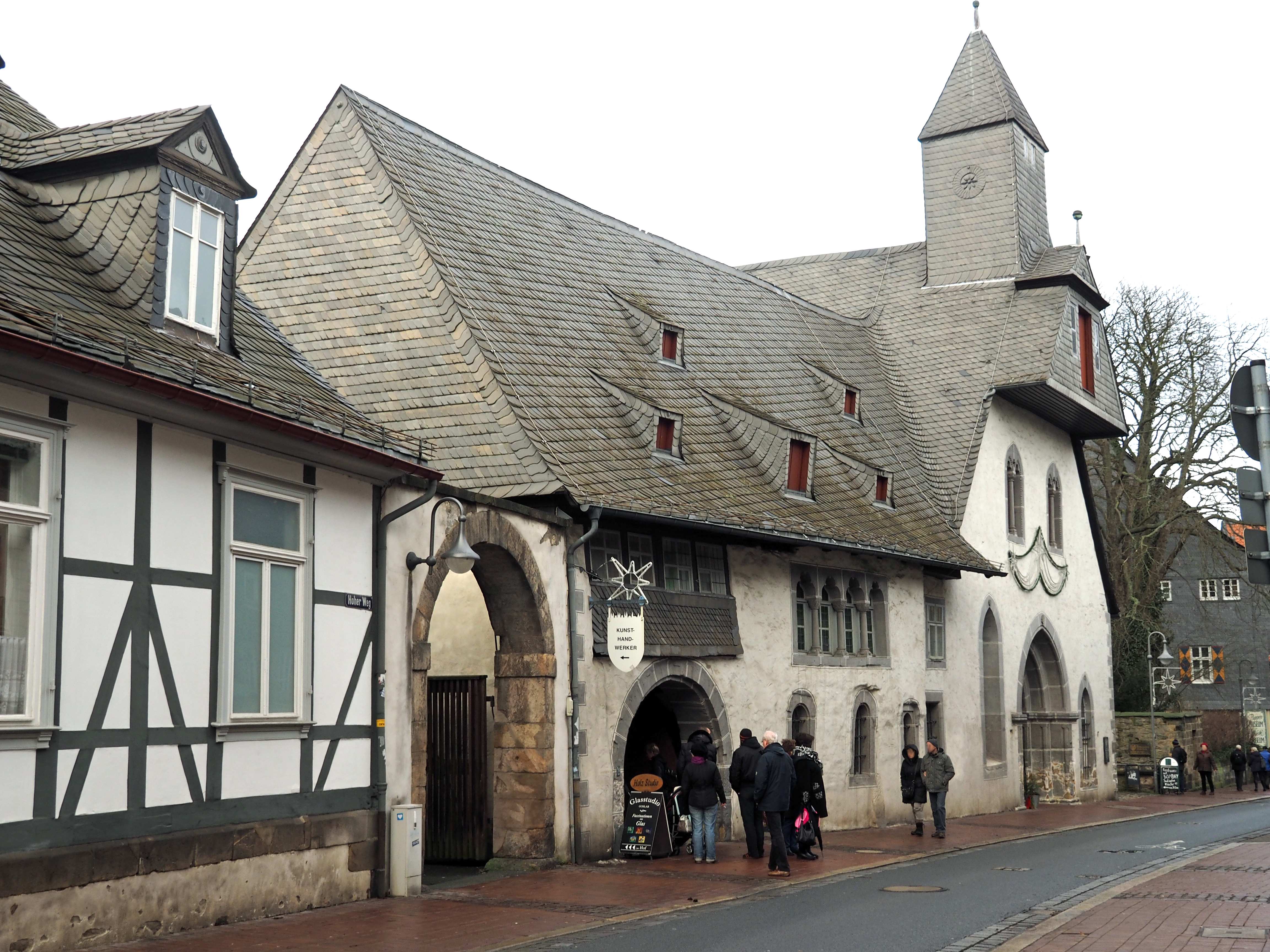 Gebäude „Großes Heiliges Kreuz“ in Goslar